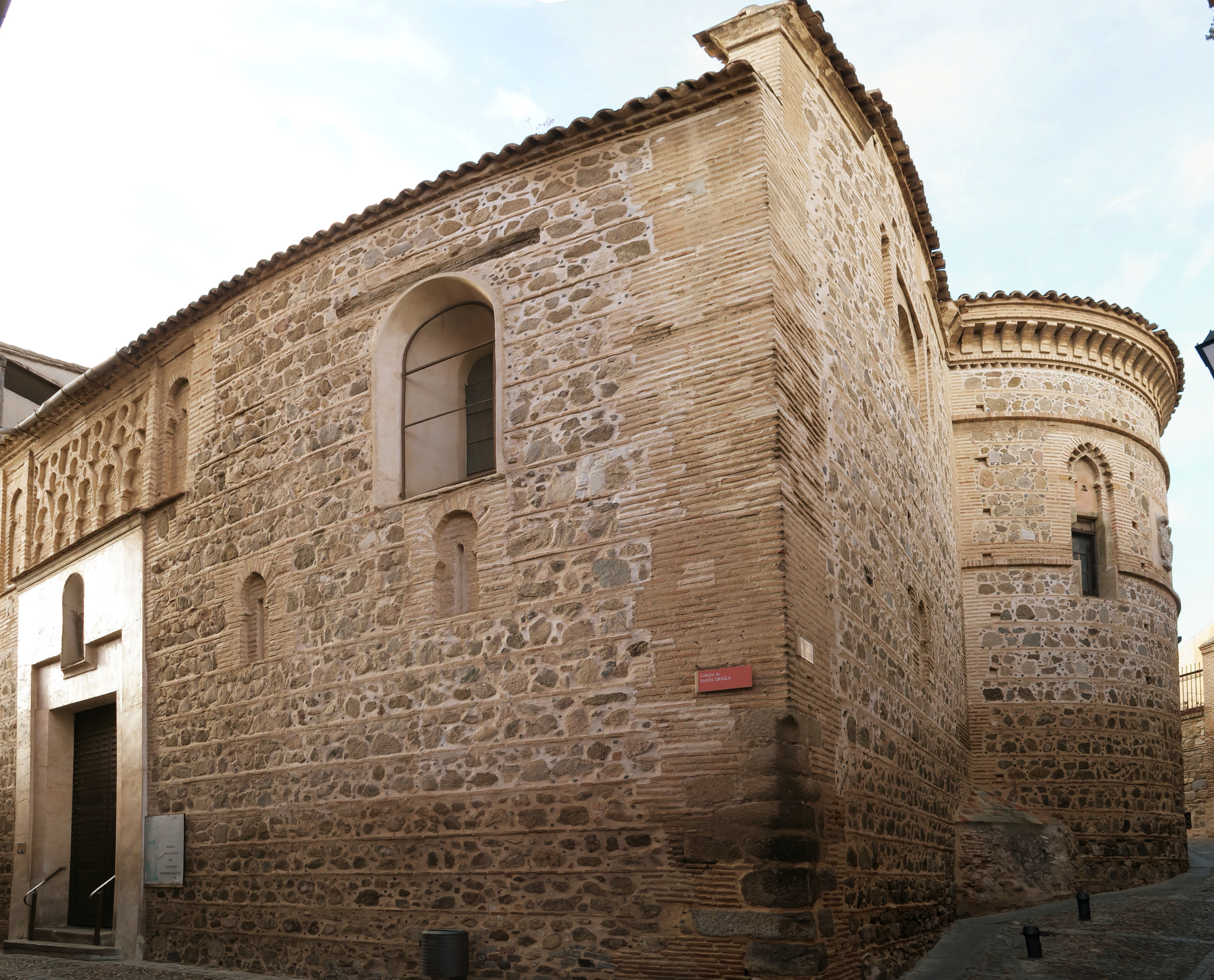 Convento de Santa Úrsula (panorámica)